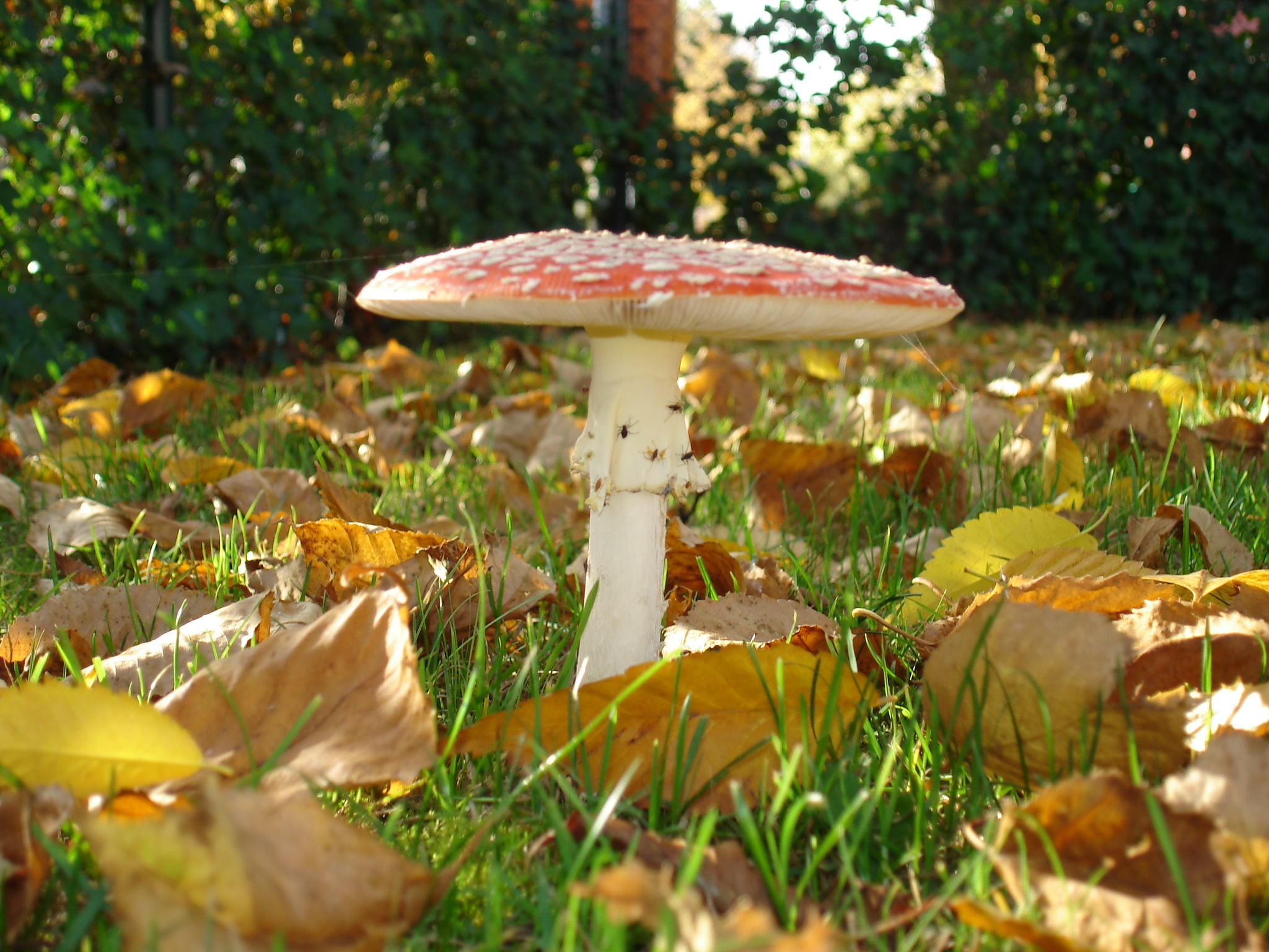 Omschrijving